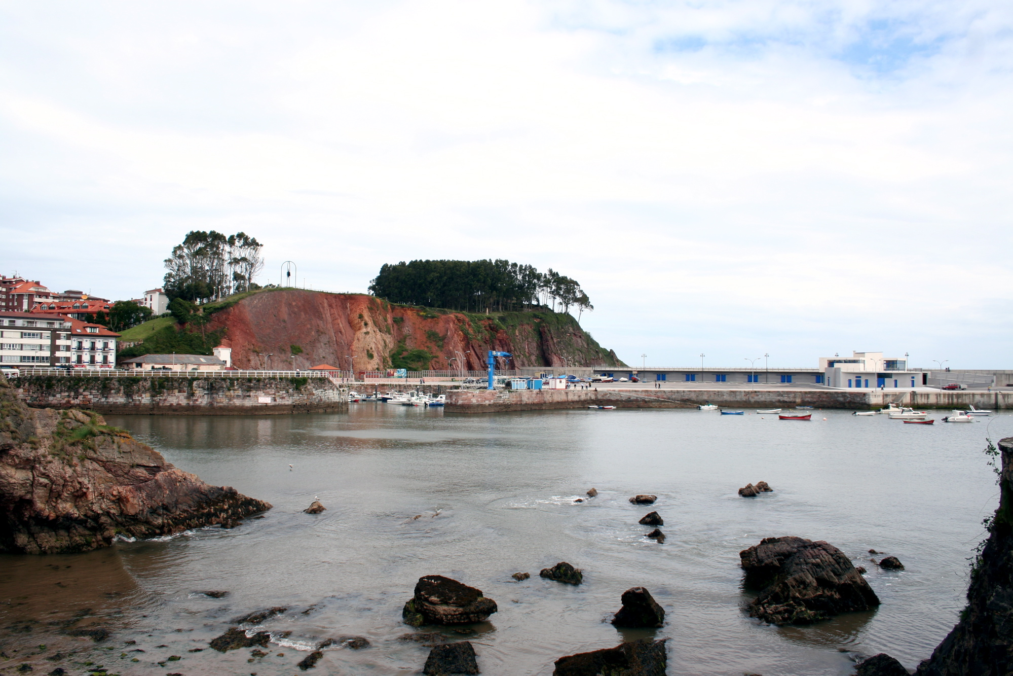 Puerto del pueblo de marinero de Candás, en Asturias, España